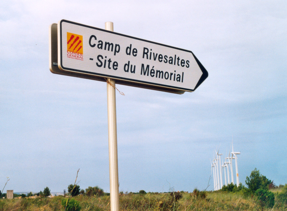 Rivesaltes